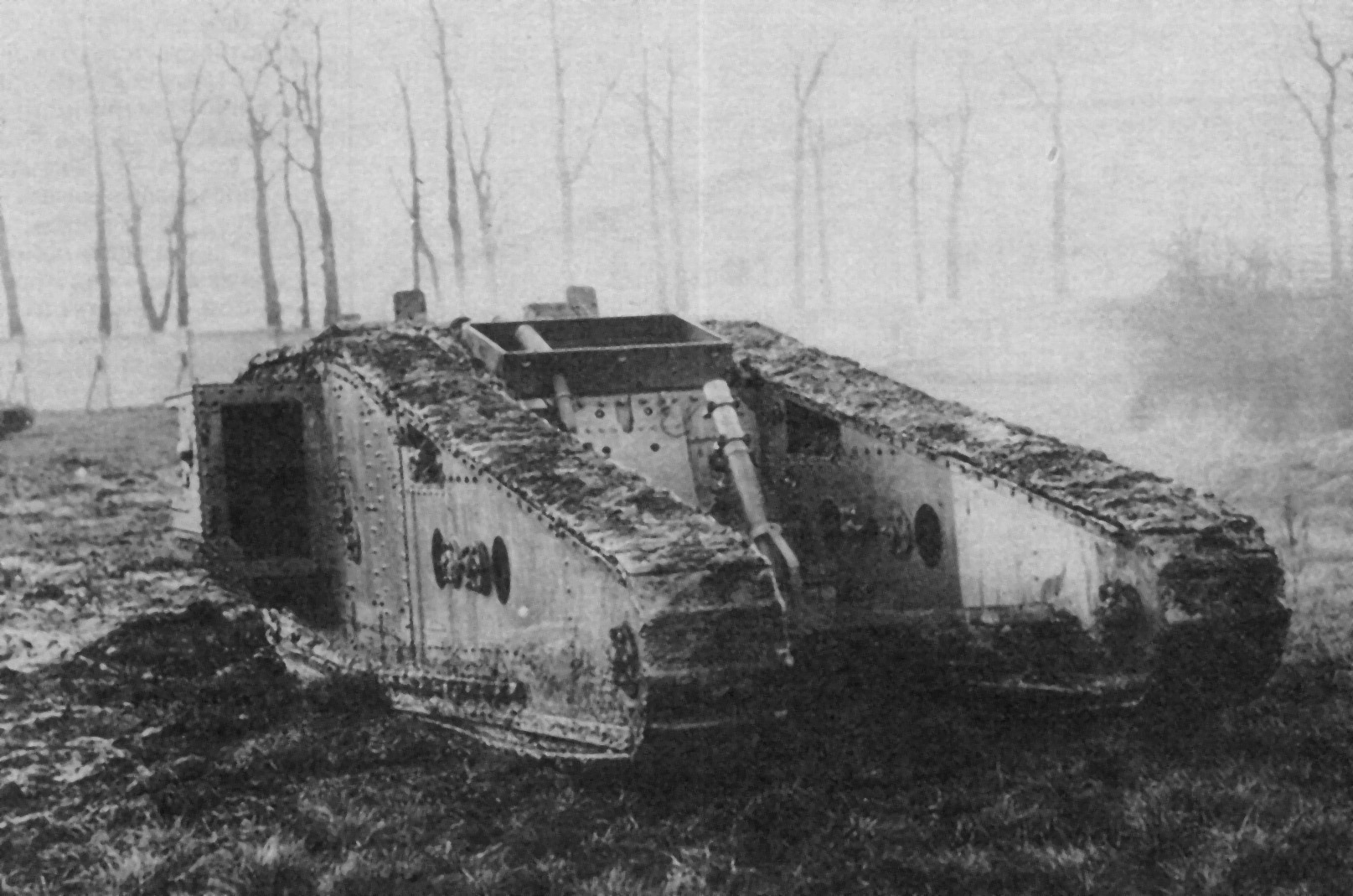 Опытный британский тяжёлый танк Mk IV «Tadpole» с гусеничным обводом, сильно удлинённым и пониженным в кормовой части. Вид с кормы. Между гусеницами на специальной платформе в опытном порядке установлен 81,2-мм миномёт Стокса.